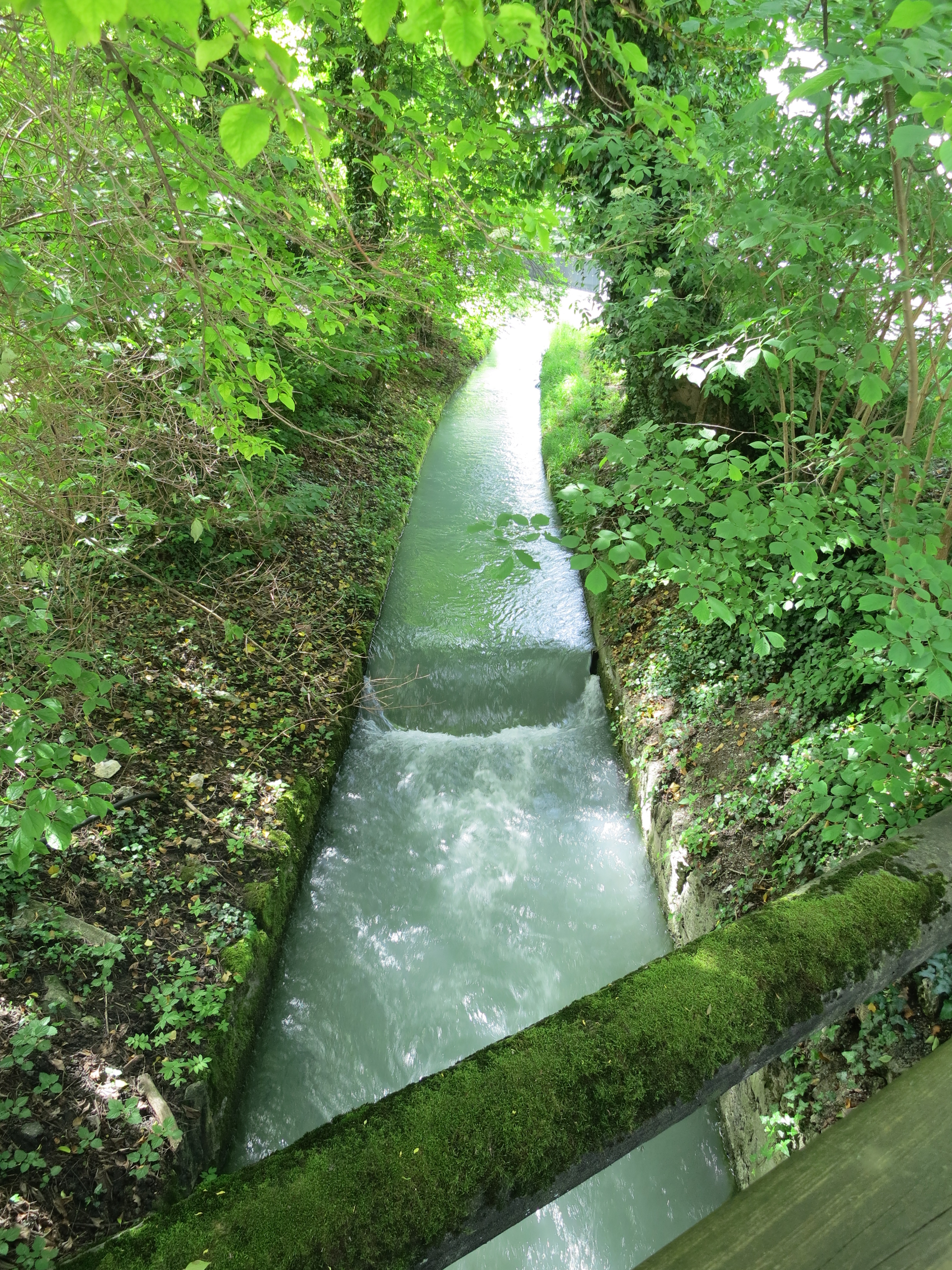 Der Städtische Arm (Neutorarm) des Almkanals kurz vor der Reichenhaller Straße